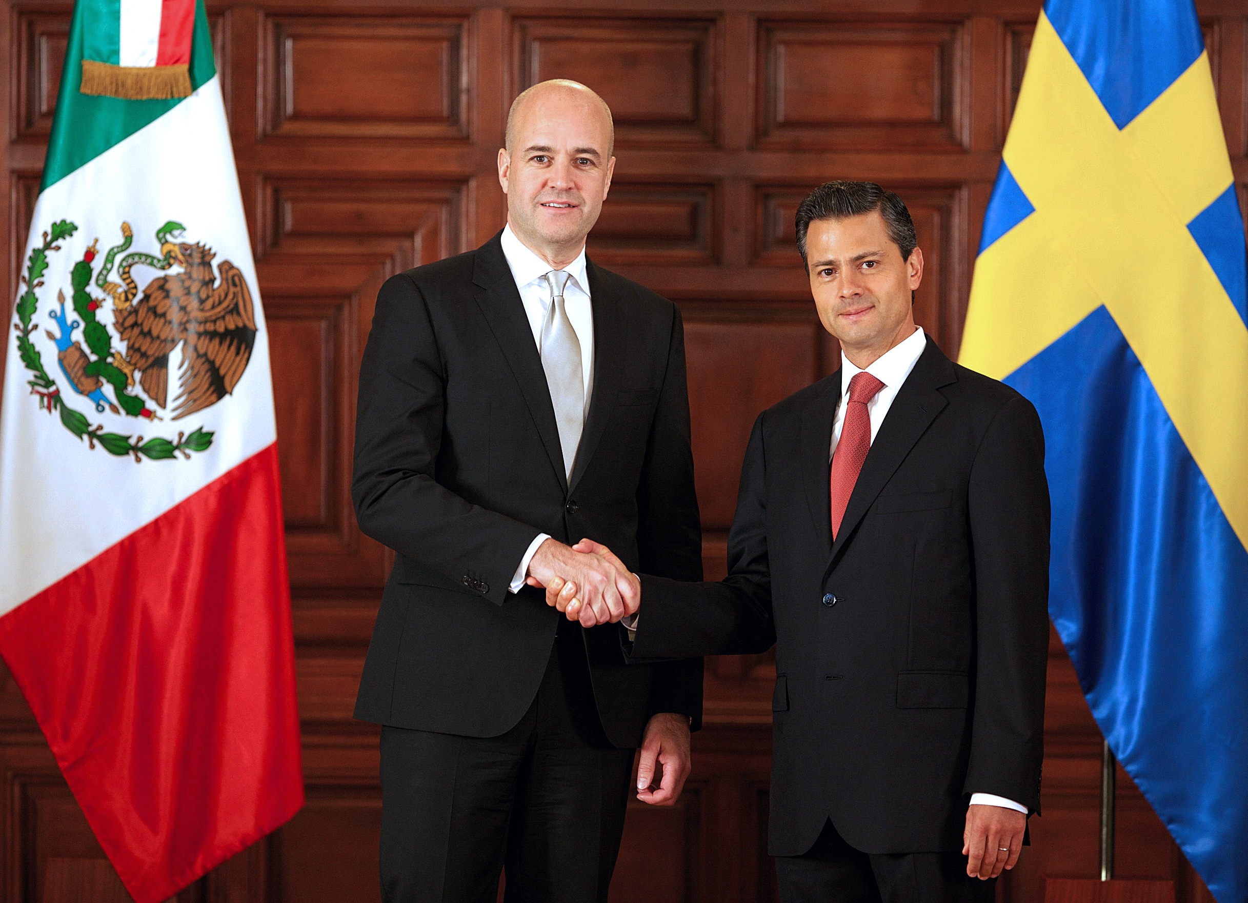 Visita de Trabajo del Primer Ministro del Reino de Suecia, Fredrik Reinfeldt. Palacio Nacional, Ciudad de México. 27 de septiembre de 2013.